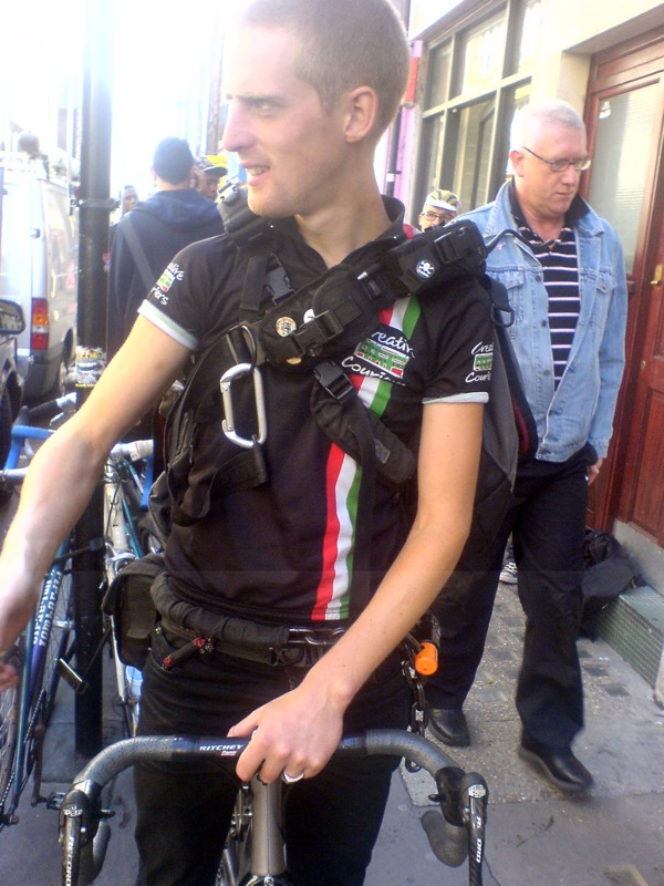 London bicycle messenger (cycle courier), 2007